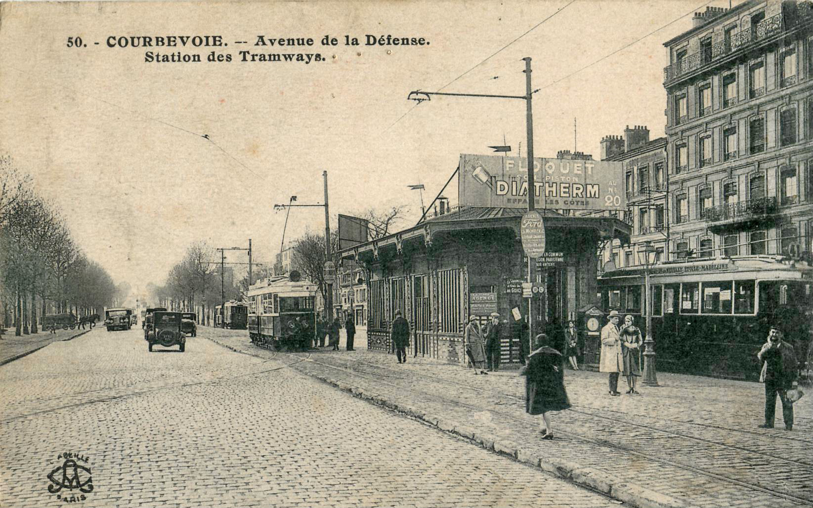 Carte postale ancienne éditée par Abeille à Paris, n°50 :COURBEVOIE - Avenue de la Défense - Station des Tramways